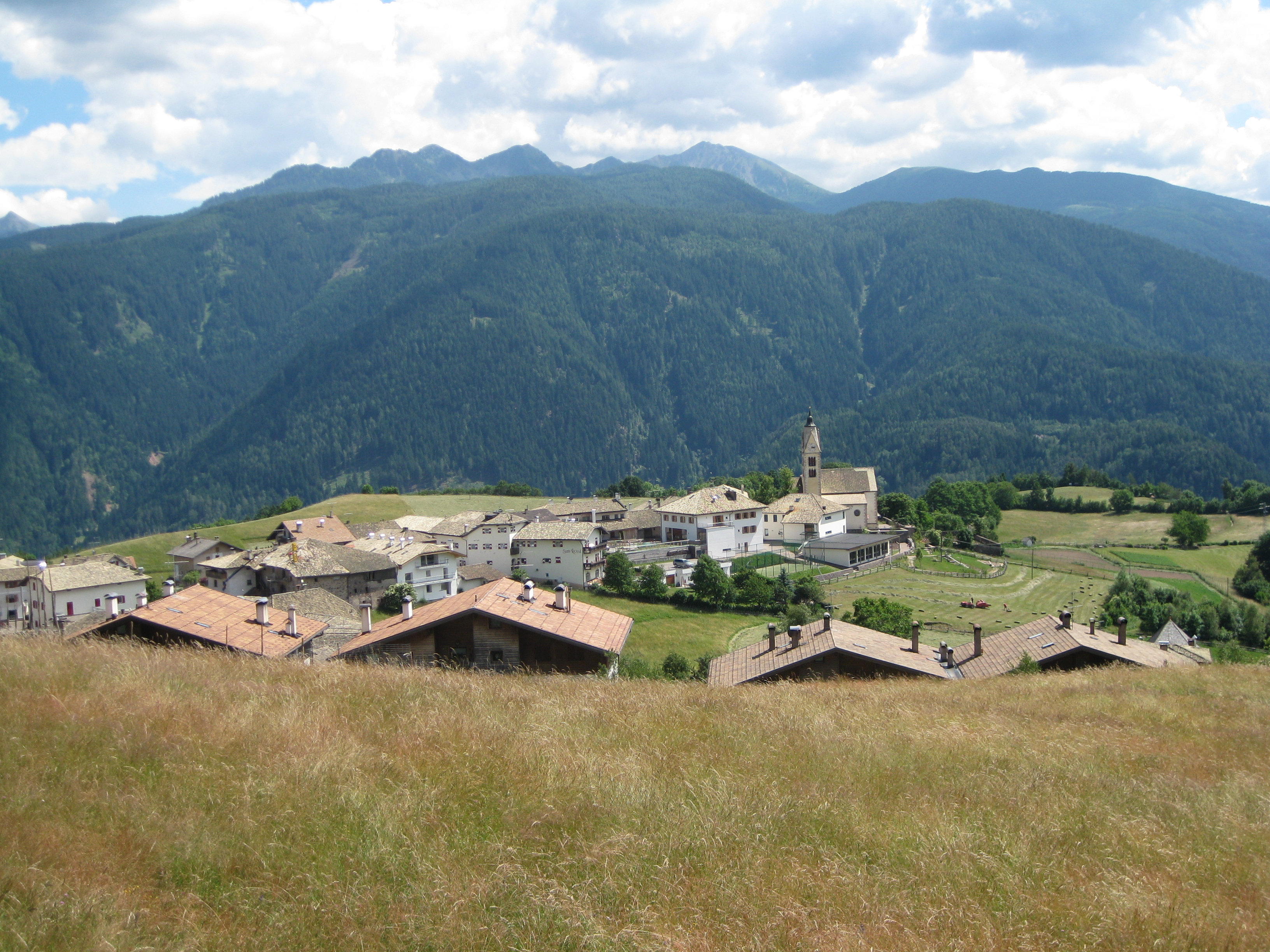 Altrei